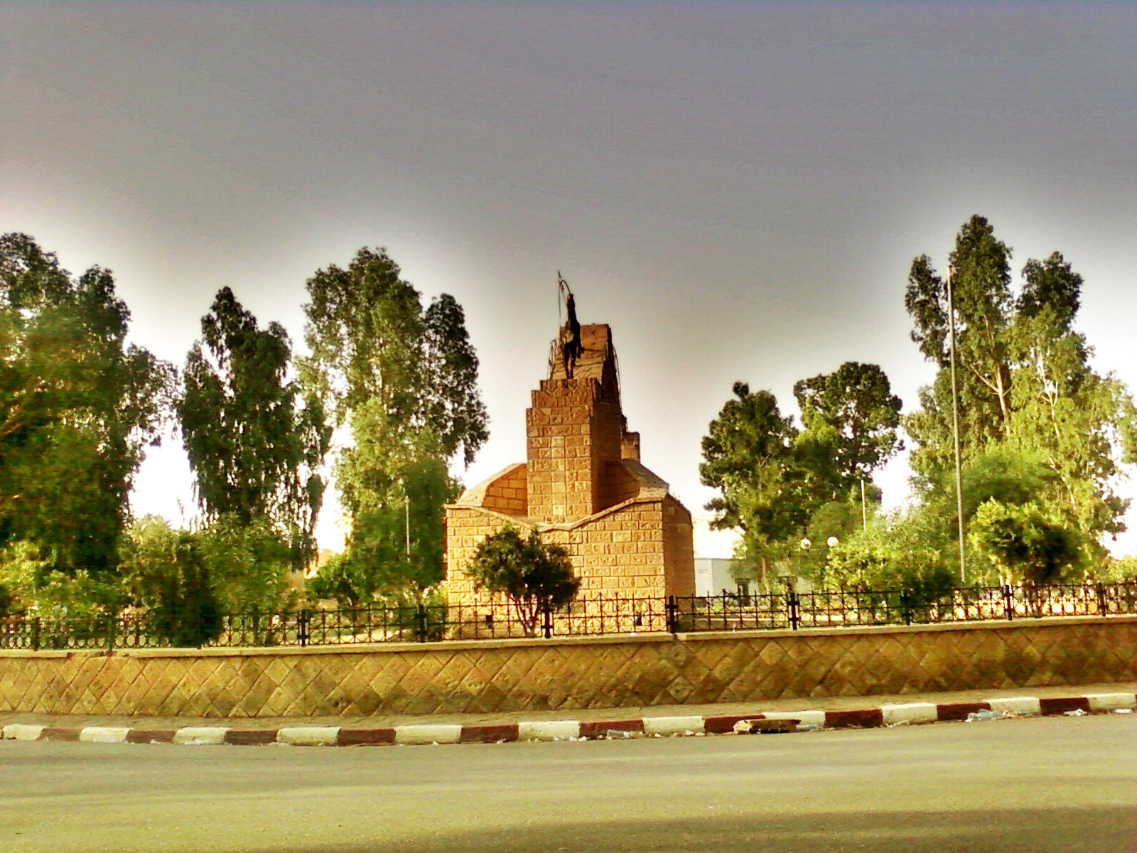 Laghouat Monument Near Taxi's Station, Algeria